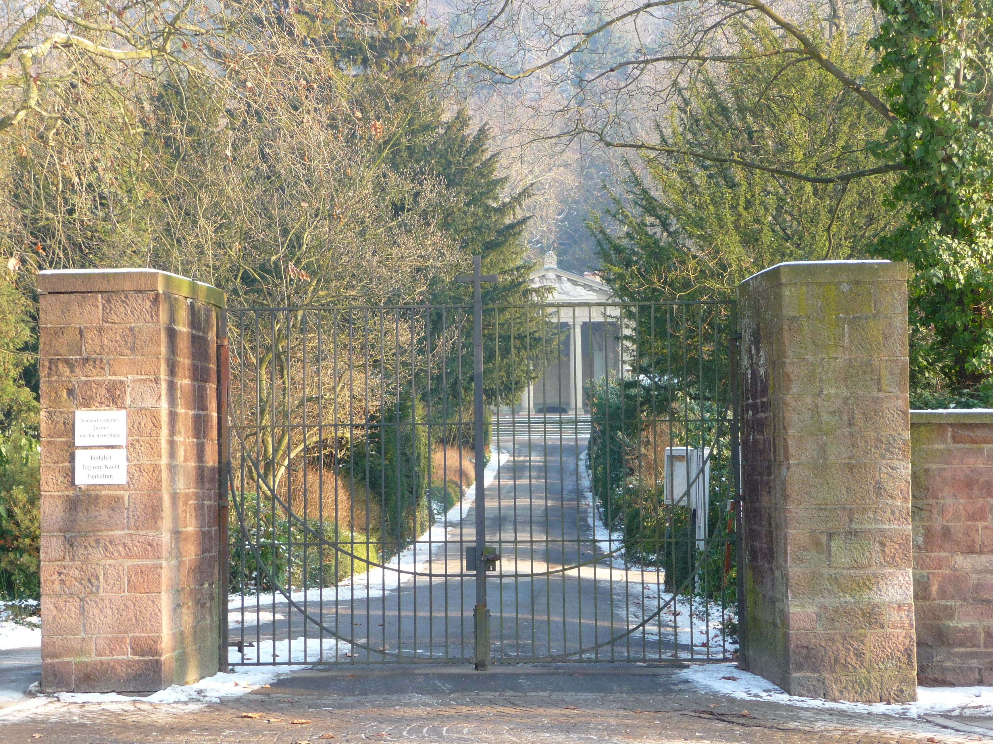 Heidelberg (Südstadt) - Haupteingang des Bergfriedhofs